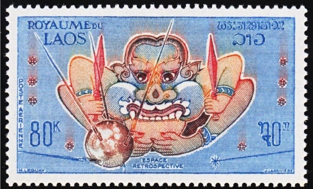 dernier timbre dessiné par Marc Leguay pour le royaume du Laos (1973)